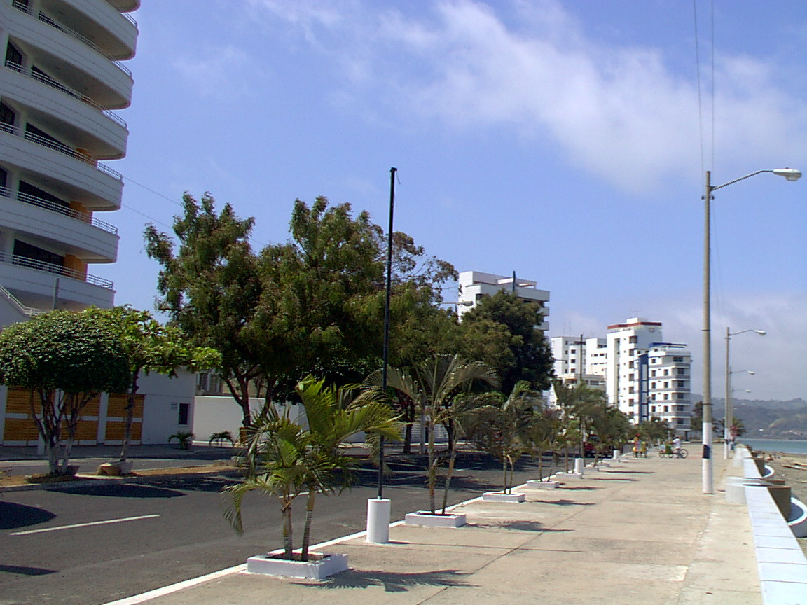 Malecón de Bahía de Caráquez, Manabi, Ecuador